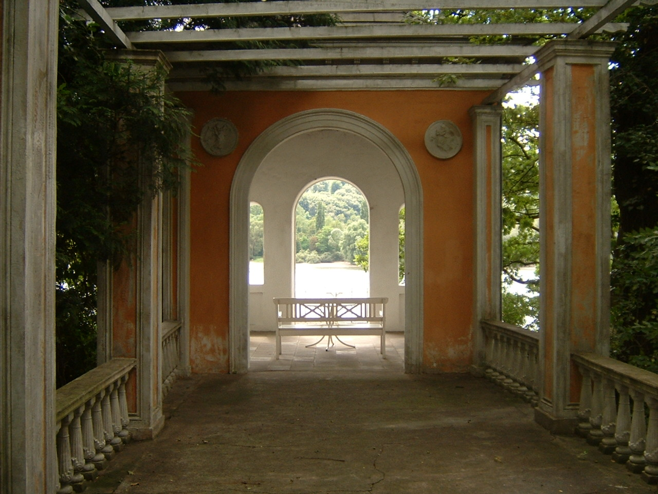 Beschreibung:Pergola der Marienburg Quelle:eigenes Bild Autor:F.Lang Datum:16.September 2004